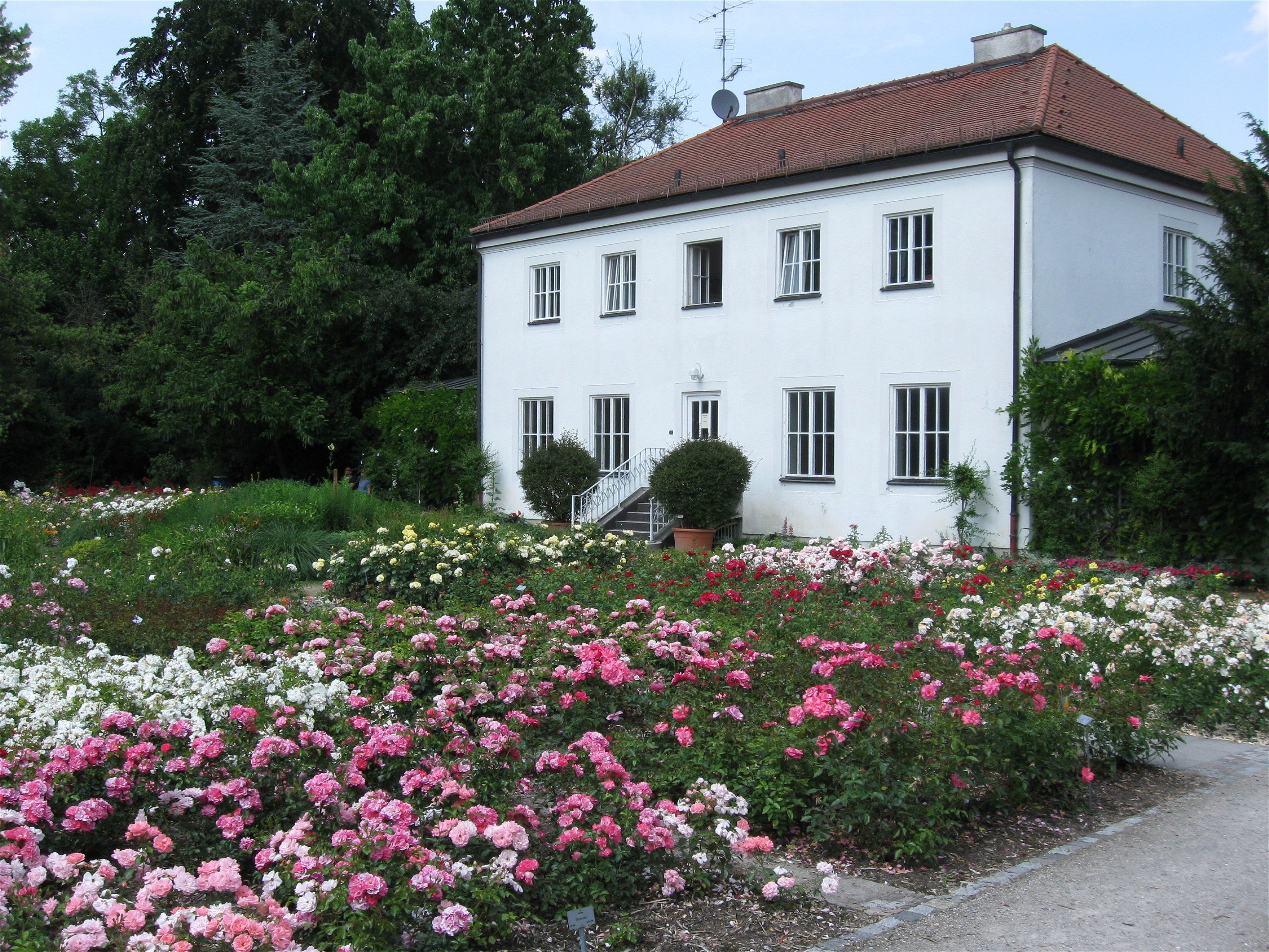 Rosengarten in Untergiesing, München